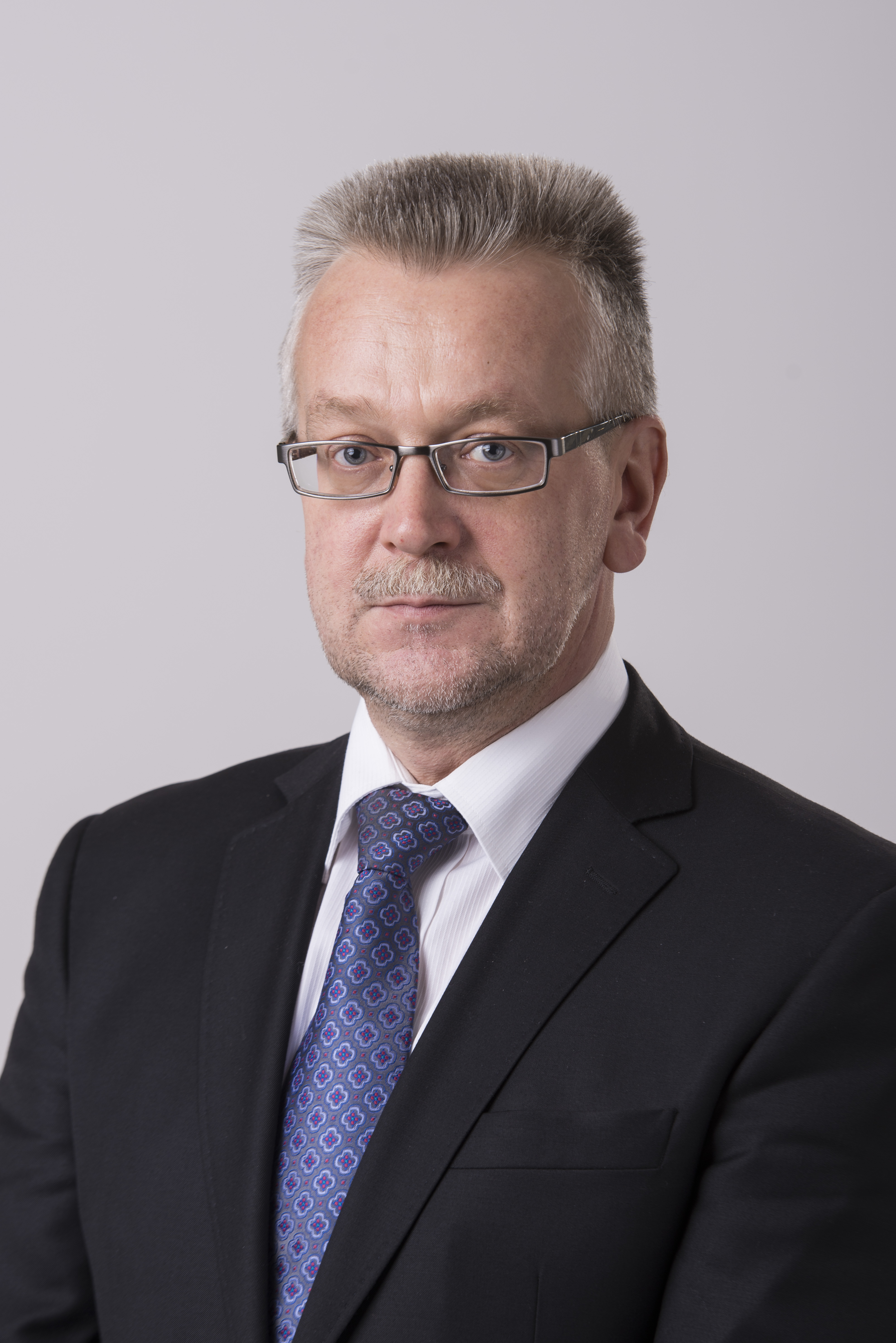 2014.gada 9.decembris. 12.Saeimas deputāts Jānis Tutins. Foto: Reinis Inkēns, Saeimas Kanceleja Izmantošanas noteikumi: saeima.lv/lv/autortiesibas